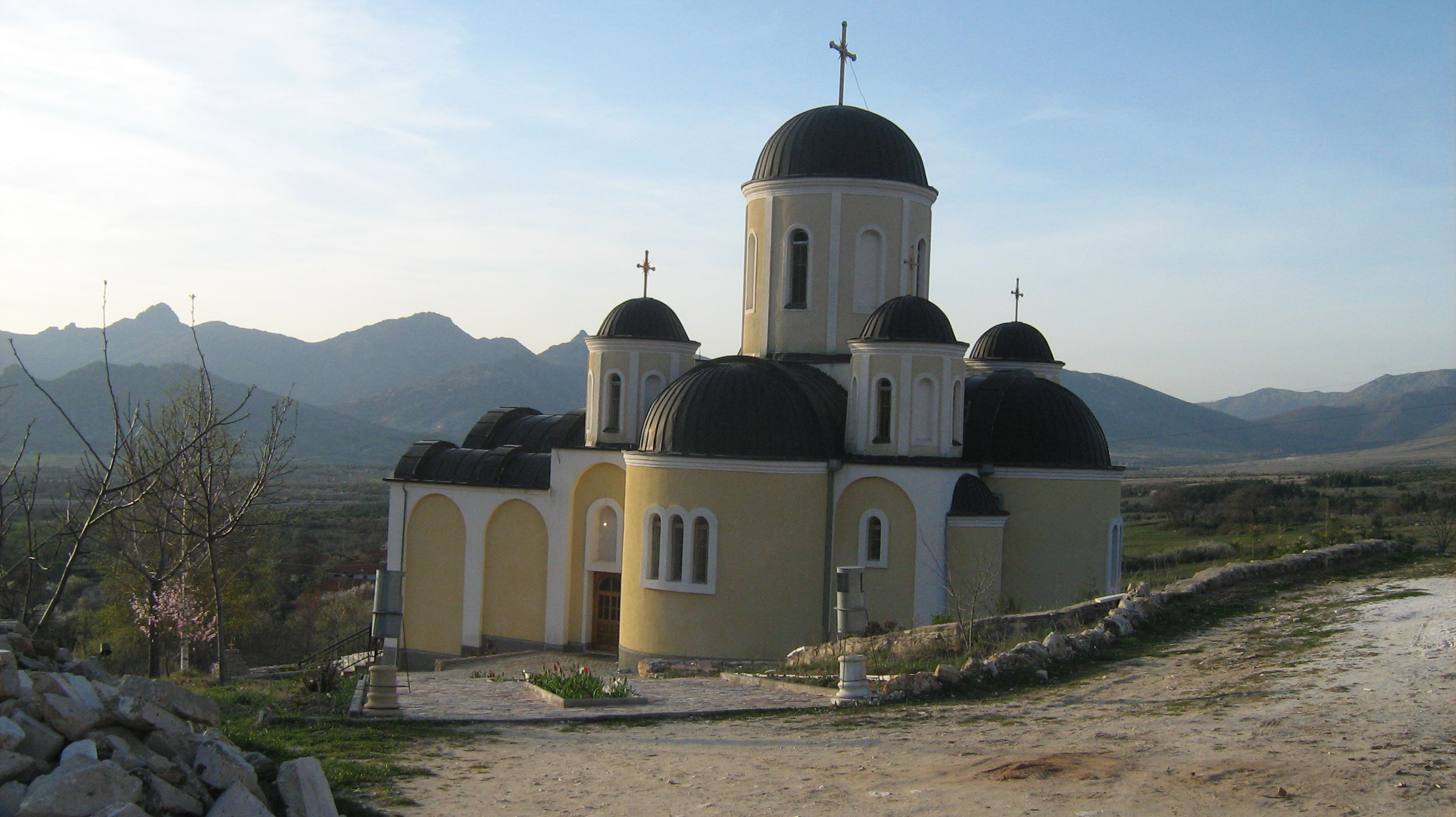 Црква Св. Петка во истоимениот манастир во село Лениште